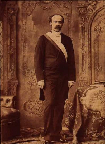 José Manuel Balmaceda. Presidente de Chile entre 1886 y 1891.